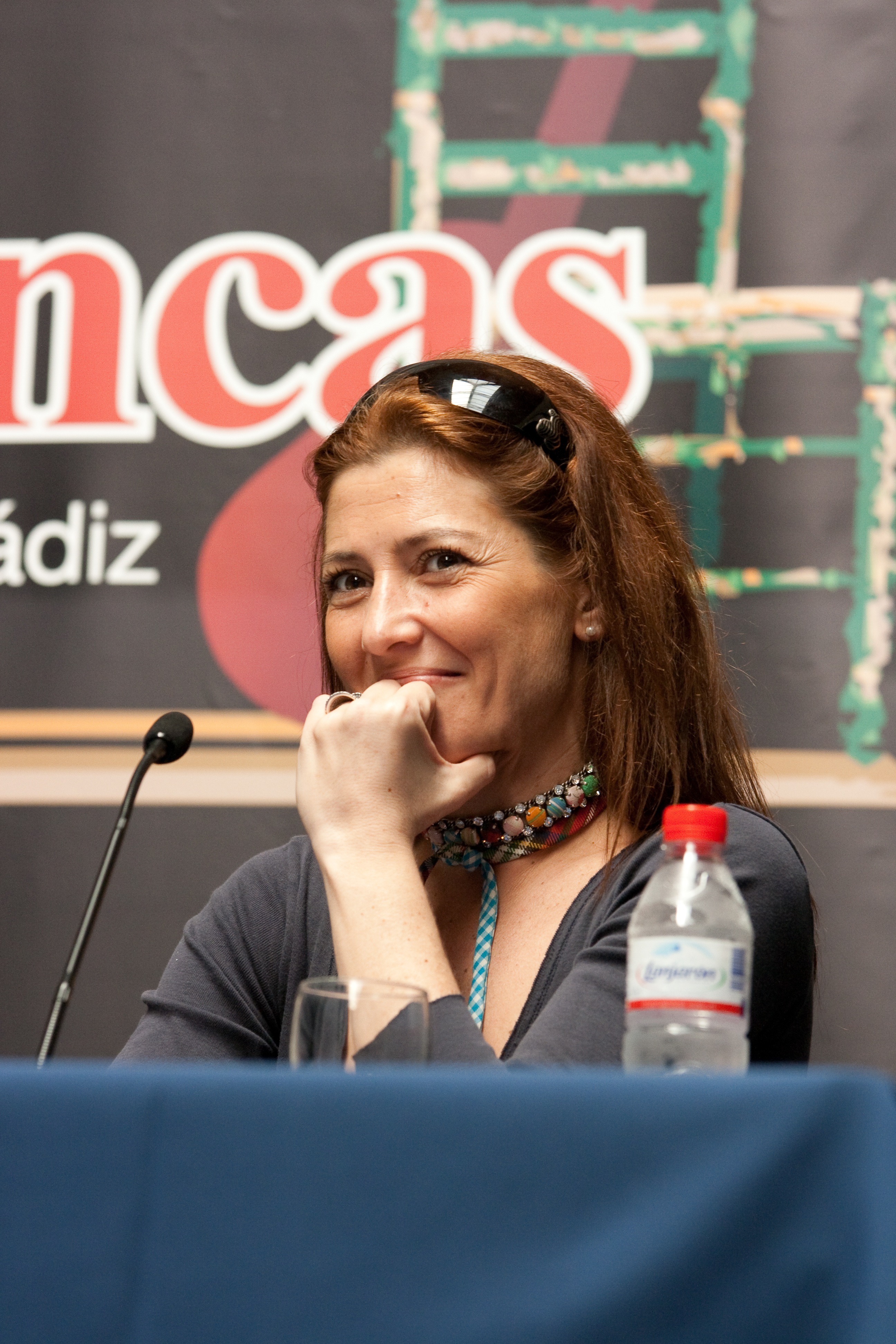 Fotografía de Sara Baras en un acto en el Aulario La Bomba de la Universidad de Cádiz.